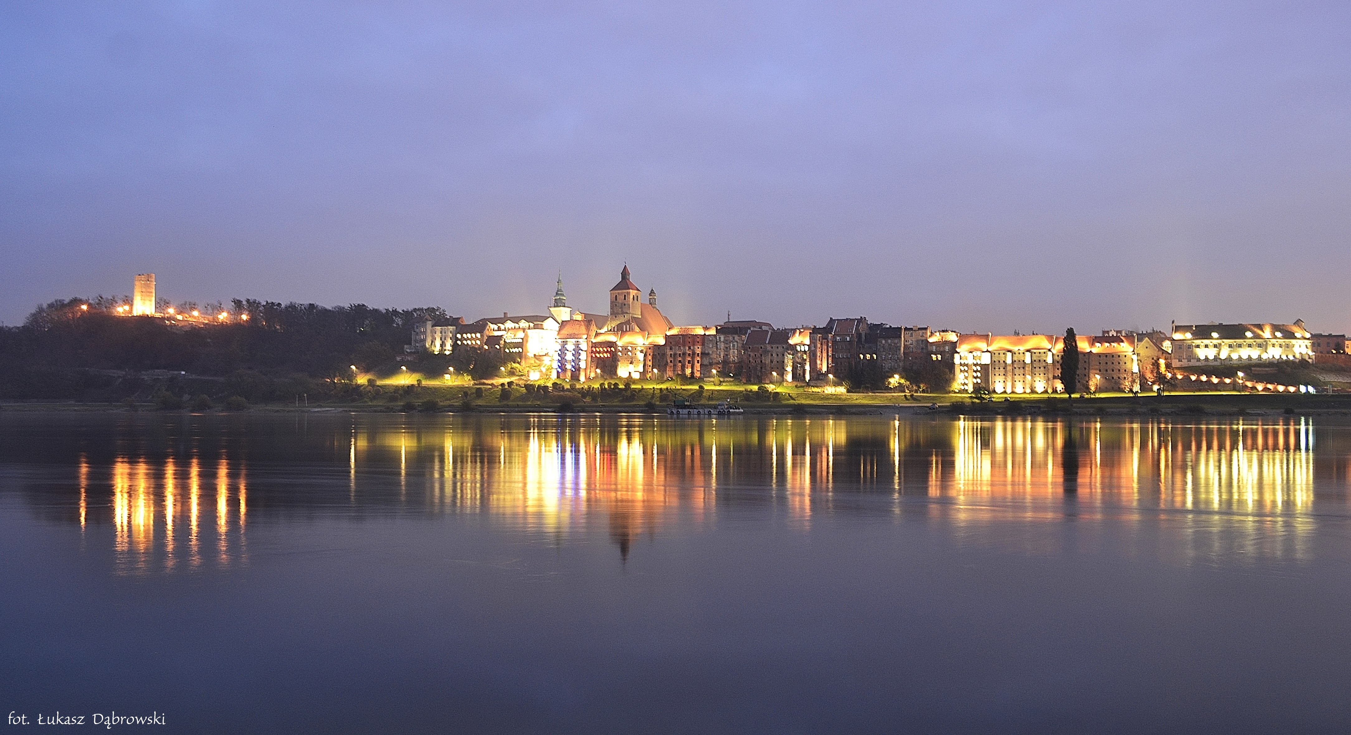 Grudziądzkie spichrza wraz z wieżą Klimek